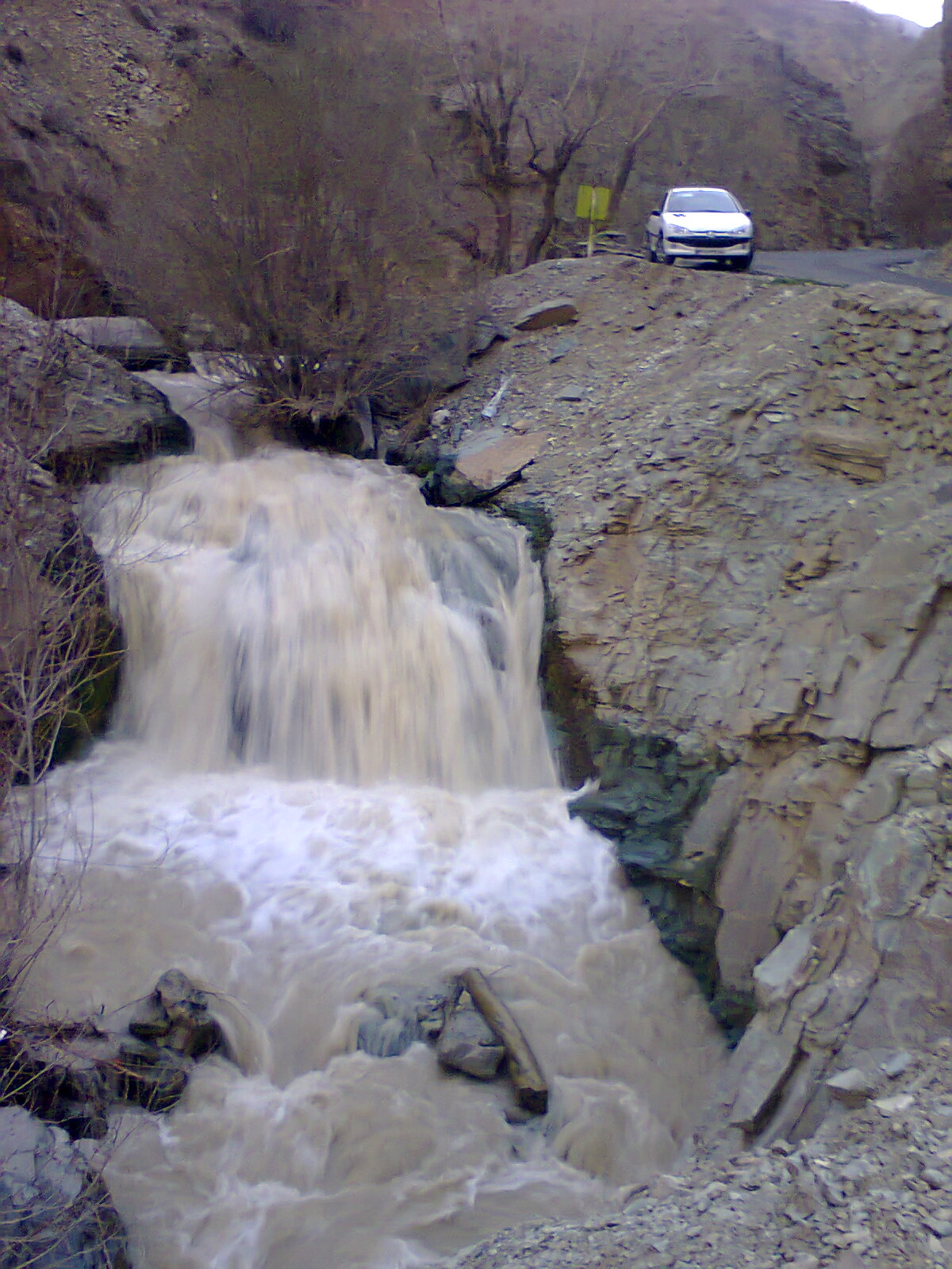 رودخانه